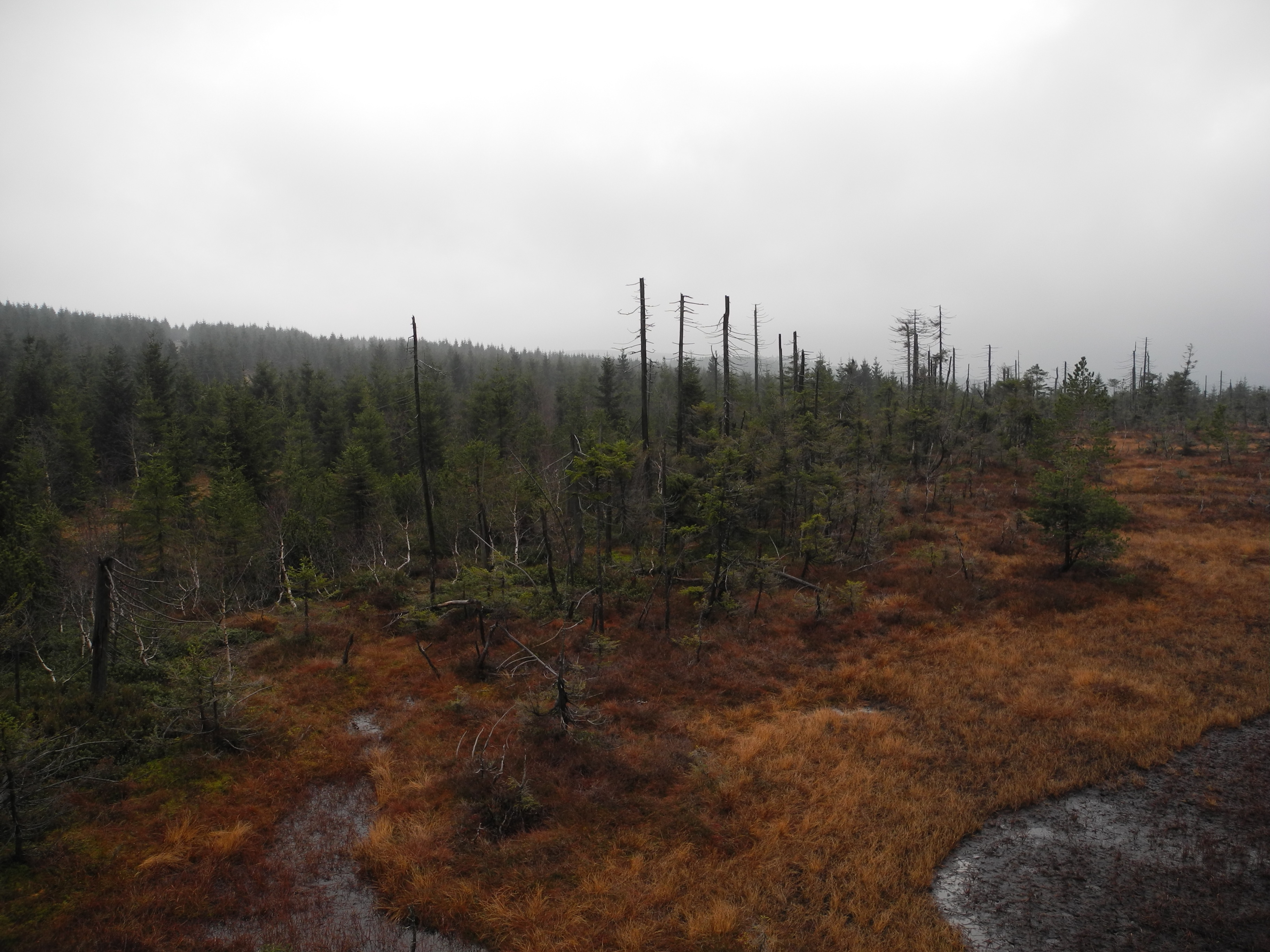 Výhled z vyhlídkové věže